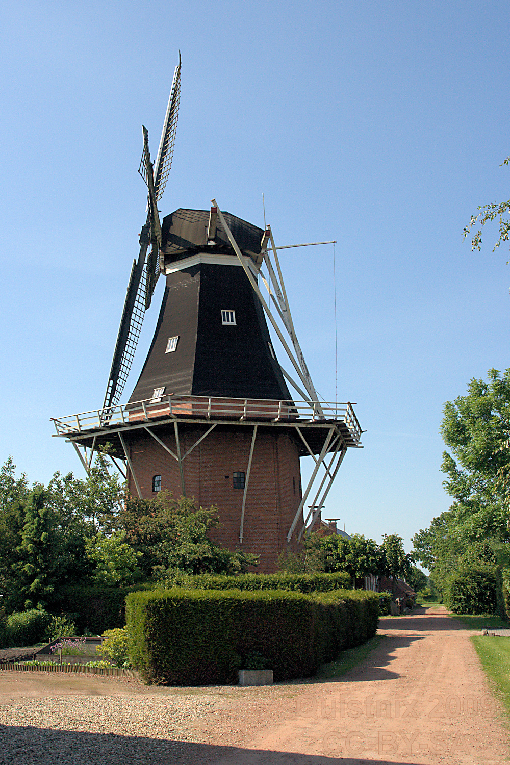 Nieberter molen, Niebert (gem. Marum, Groningen)